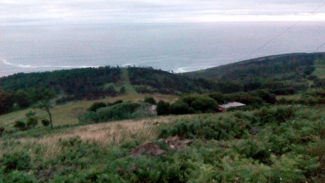 Vista de Vilarquinte, O Val.